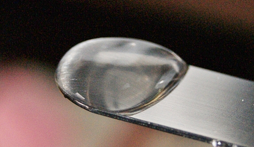 Dexpanthenol